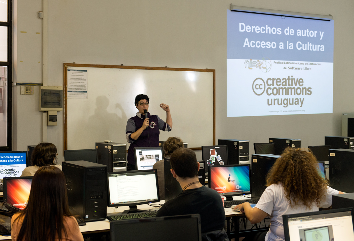 Charla de la Dra. Patricia Diaz sobre derechos de autor como integrante de Creative Commons Uruguay en el evento FLISOL 2014 en Facultad de Arquitectura de la UDELAR, Montevideo, Uruguay.